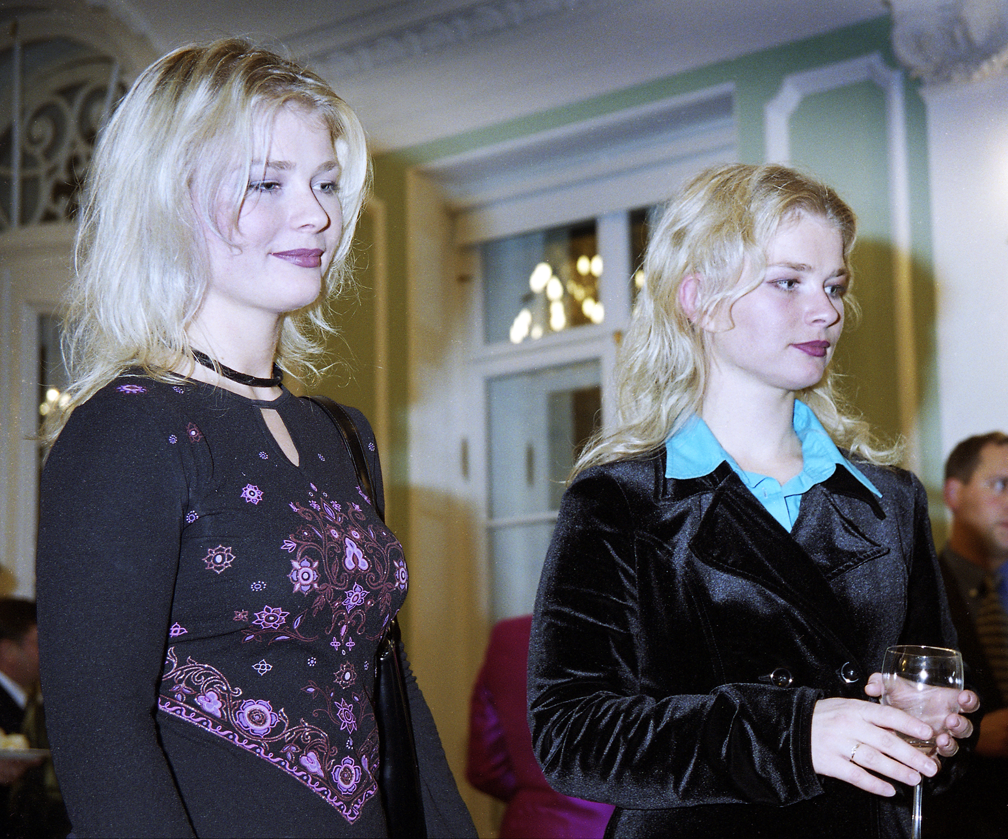 Kadri ja Anu Tali, muusikud 2000